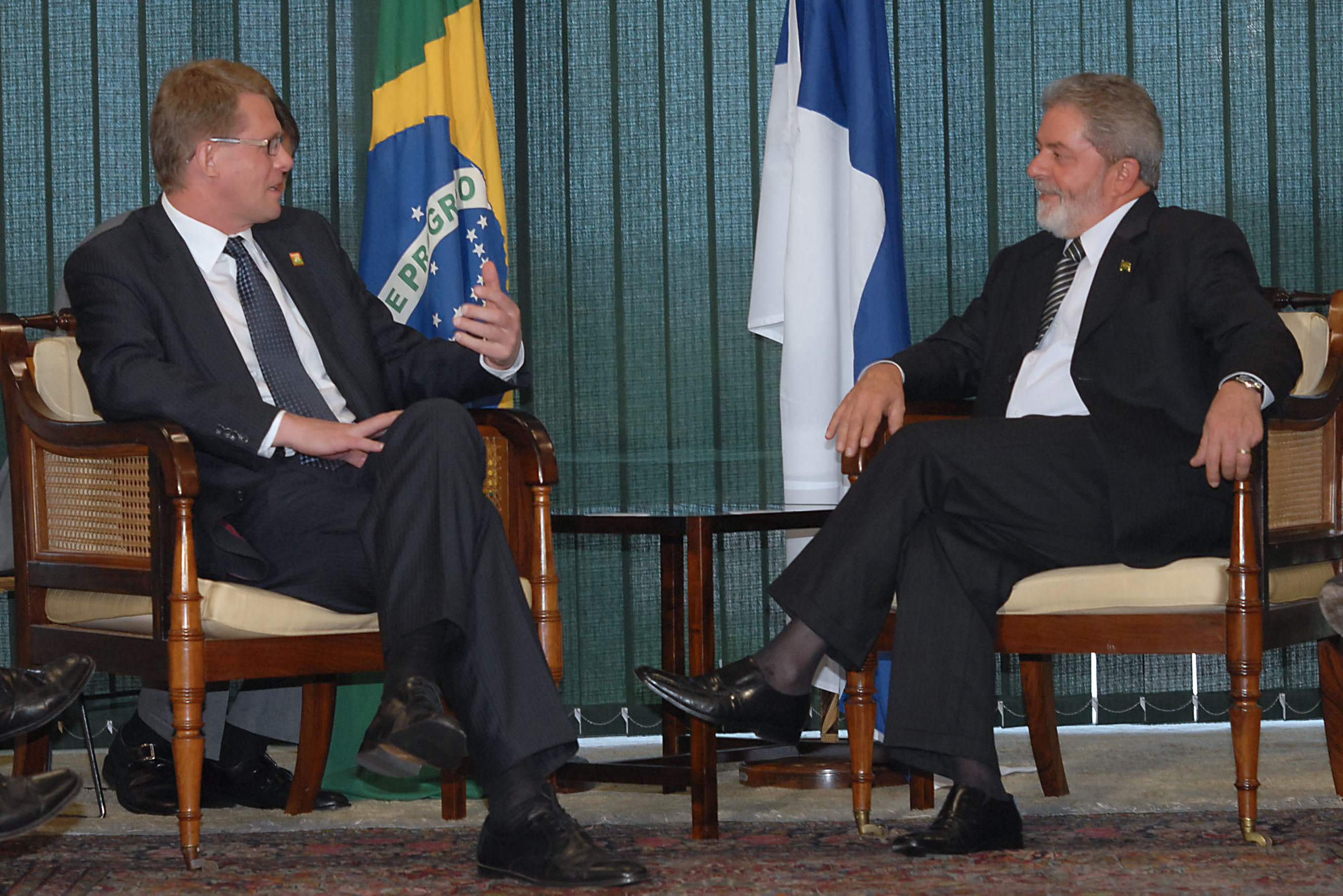 O presidente Luiz Inácio Lula da Silva recebe o primeiro-ministro da Finlândia, Matti Vanhanen